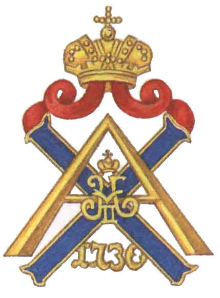 Badge of Izmajlovsky Guard Regiment